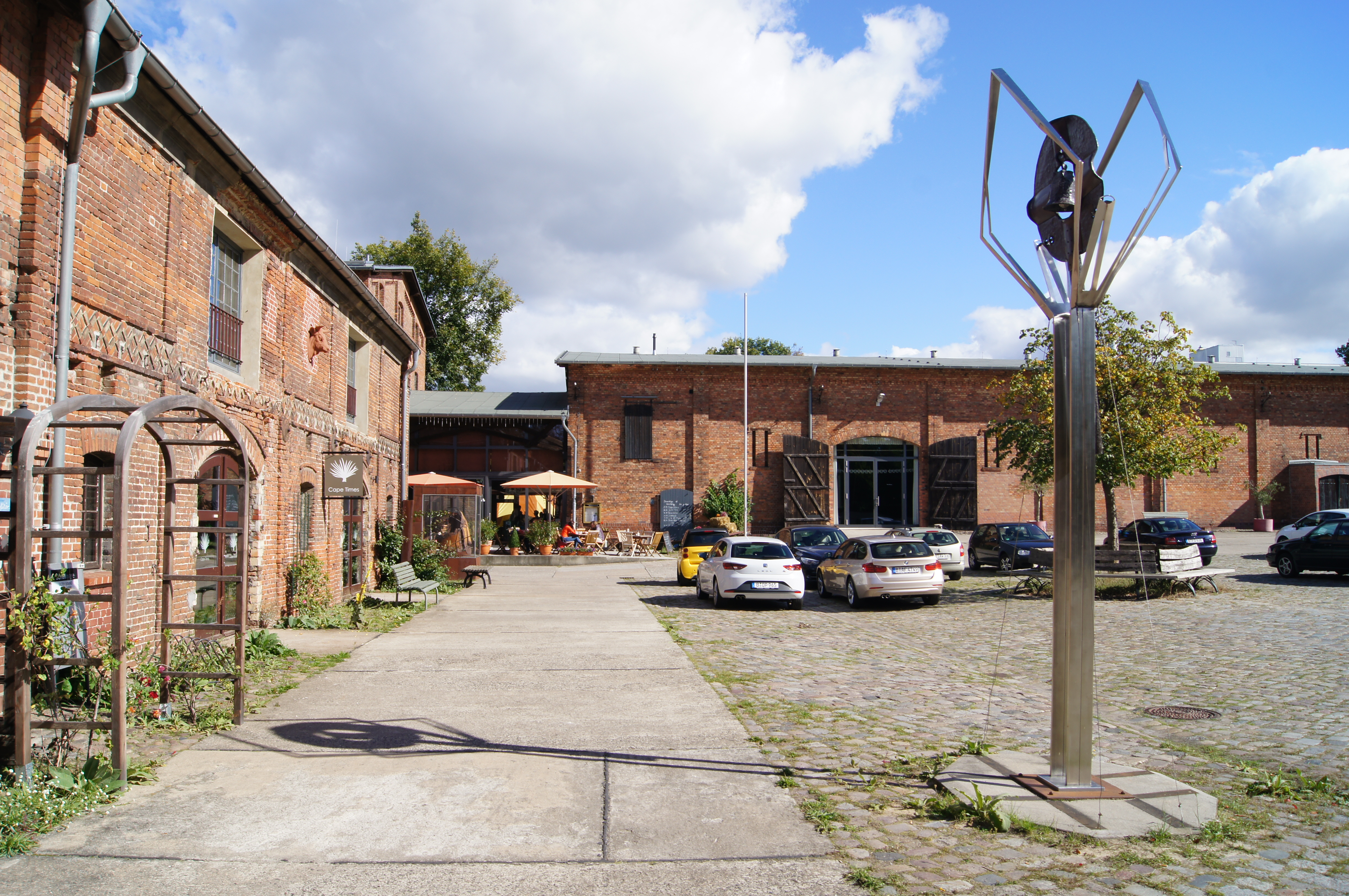 Gutshof Berlin-BuchThis is a photograph of an architectural monument.